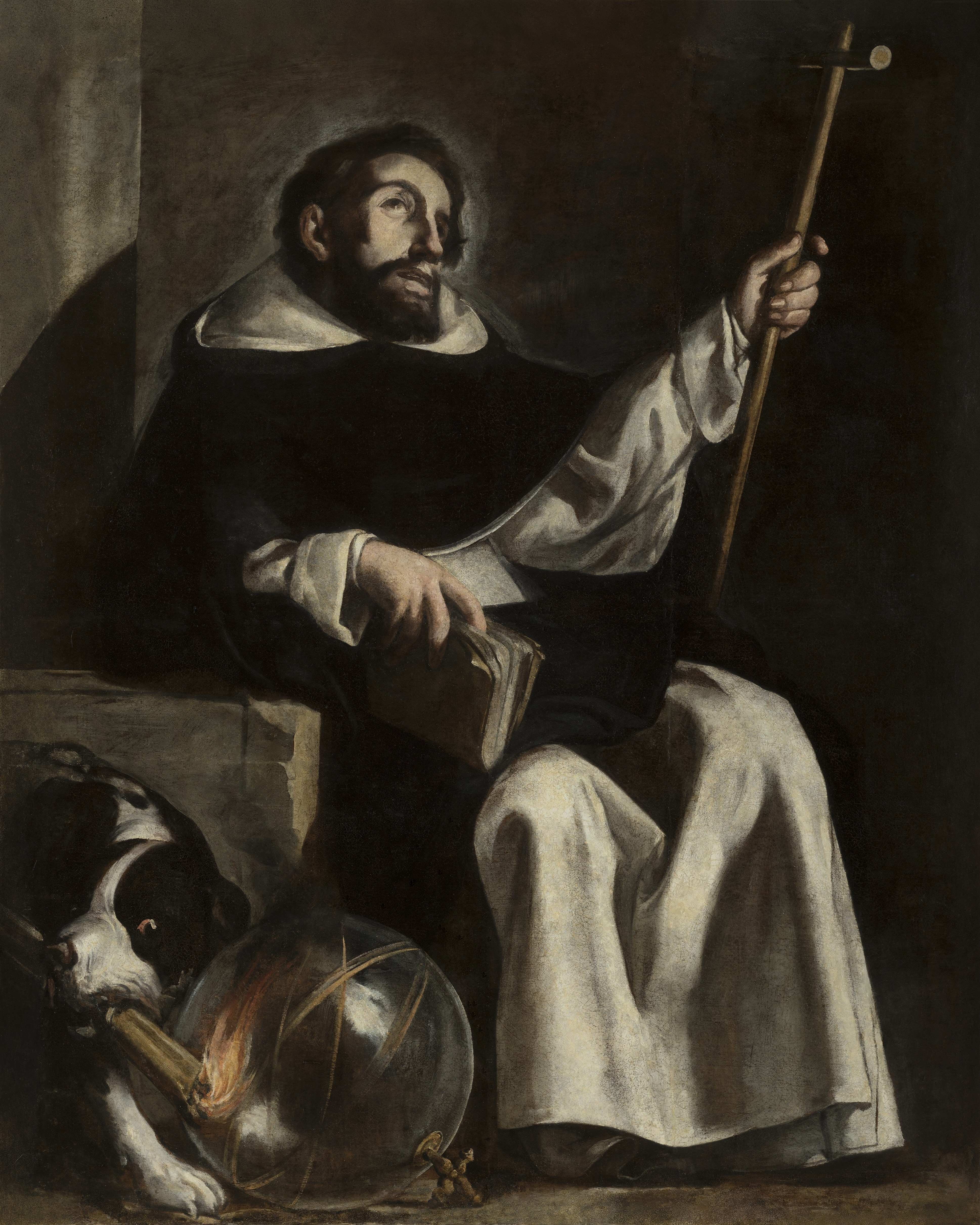 La obra representa a Santo Domingo de Guzmán, el fundador de la Orden de los dominicos.